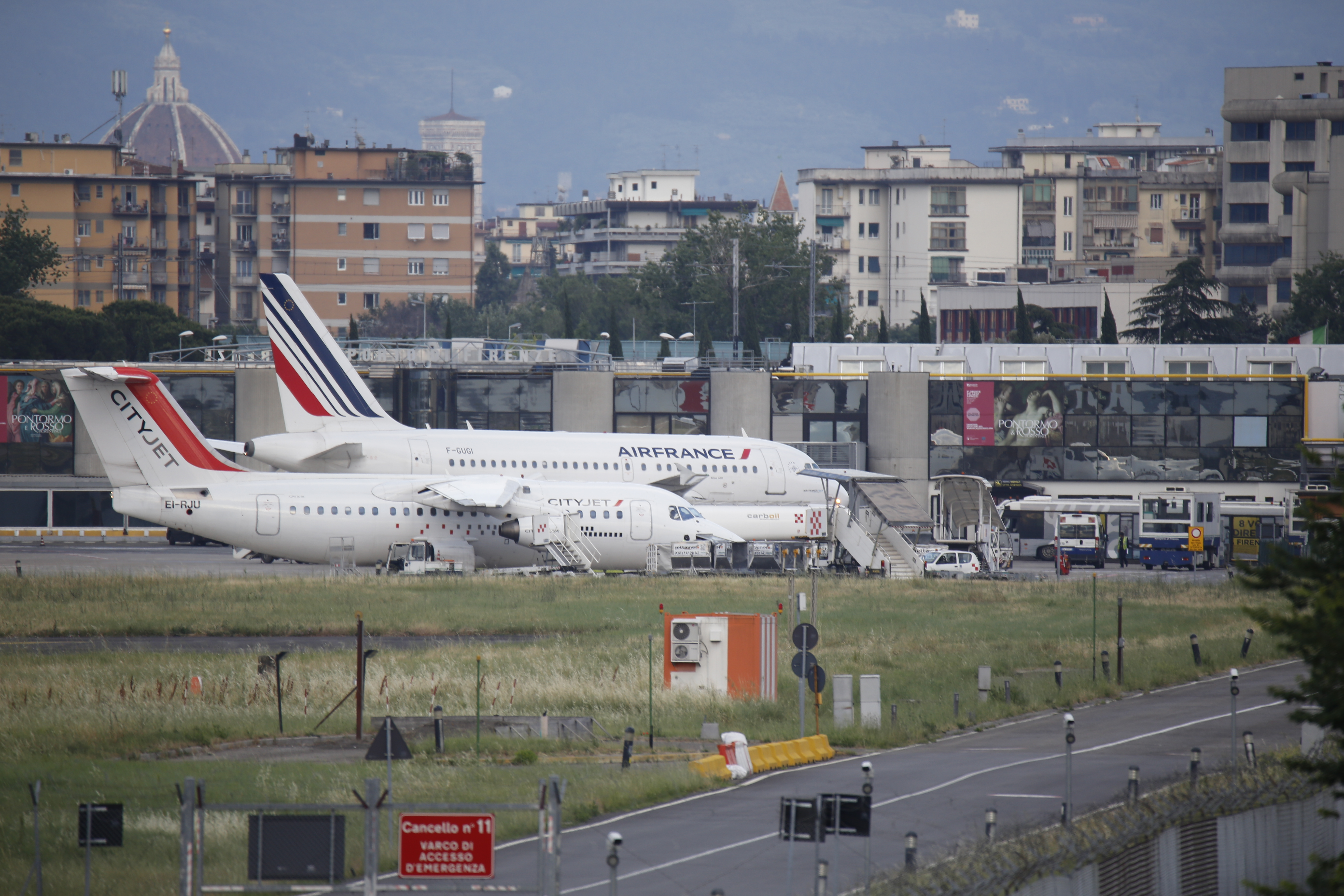 Aerei all'aeroporto di Firenze (Avro RJ85)